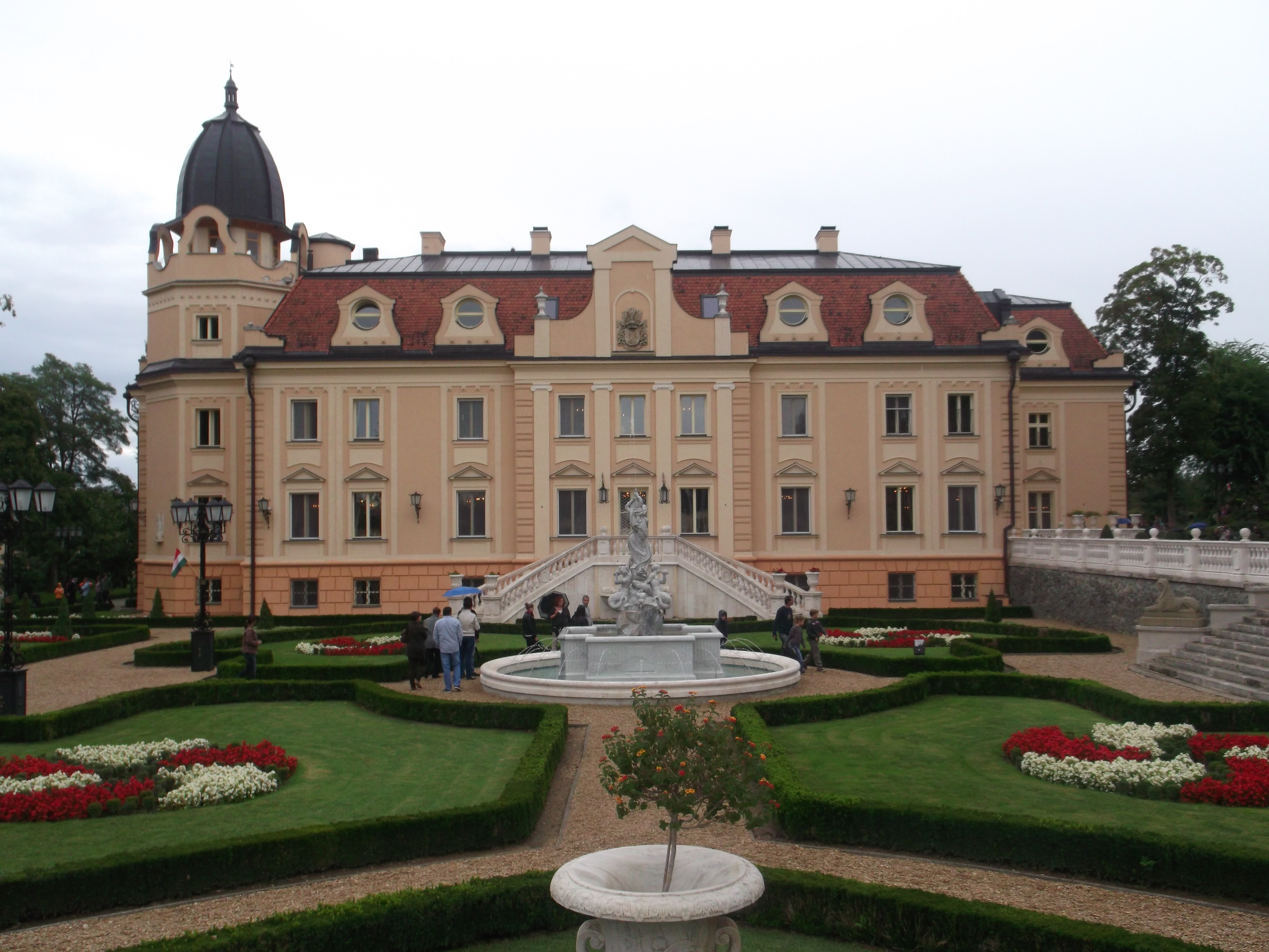 Szapáry Kastély Sorokpolány 2013 Sept. This is a photo of a monument in Hungary. Identifier: 9325